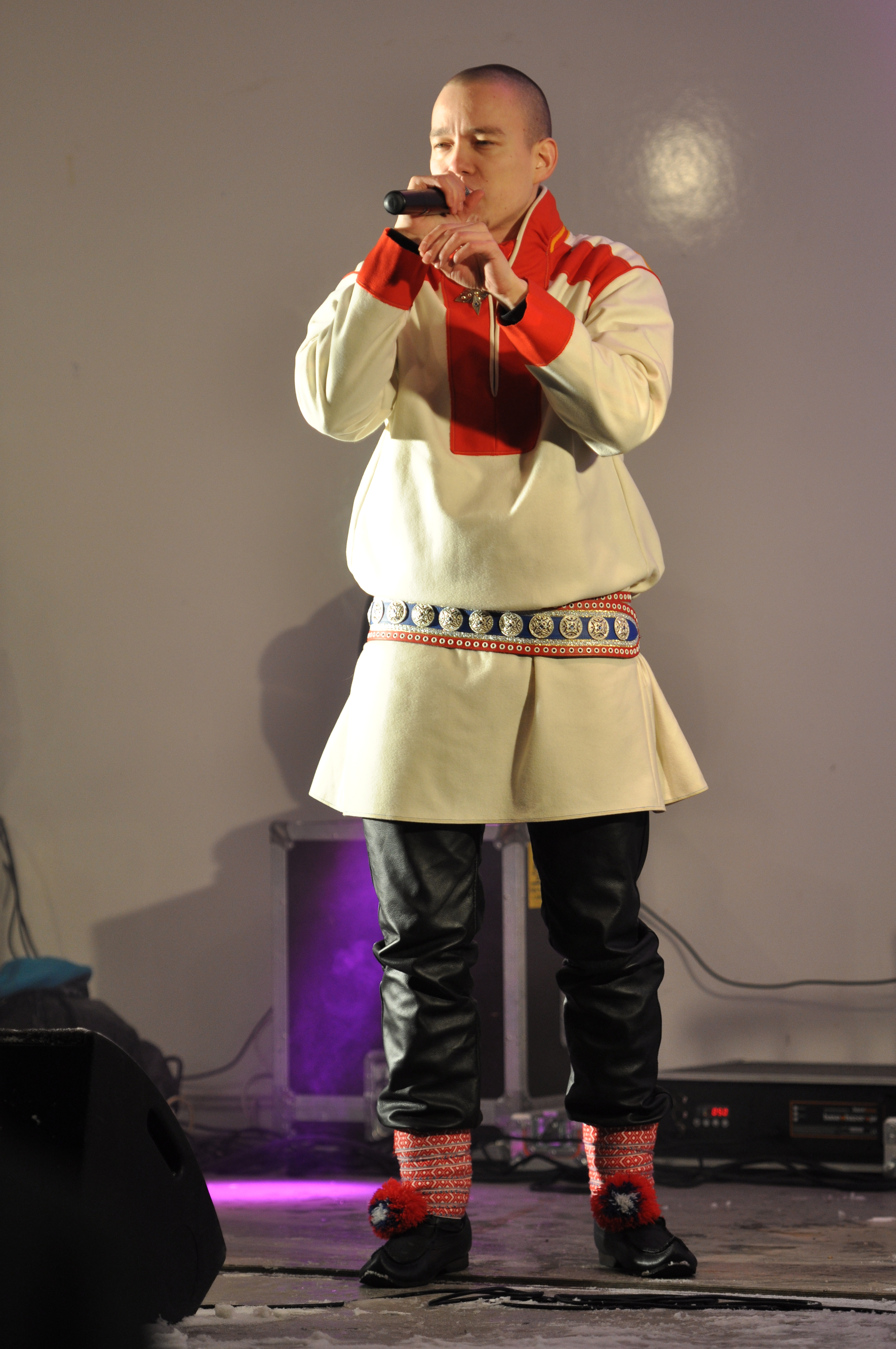 Ailu Valle on Utsjoen Kaamasmukasta kotoisin oleva rap-artisti, joka räppää pohjoissaameksi, suomeksi ja englanniksi.